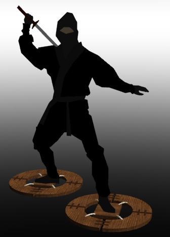 水蜘蛛の使用方法